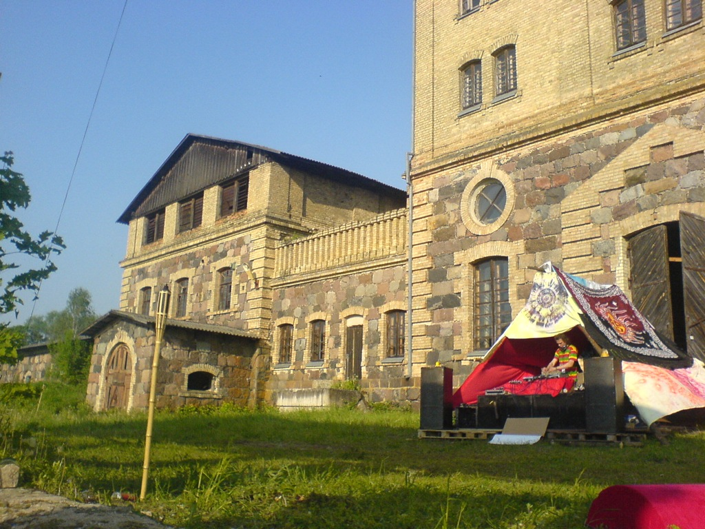 Raudondvario dvaro bravoras